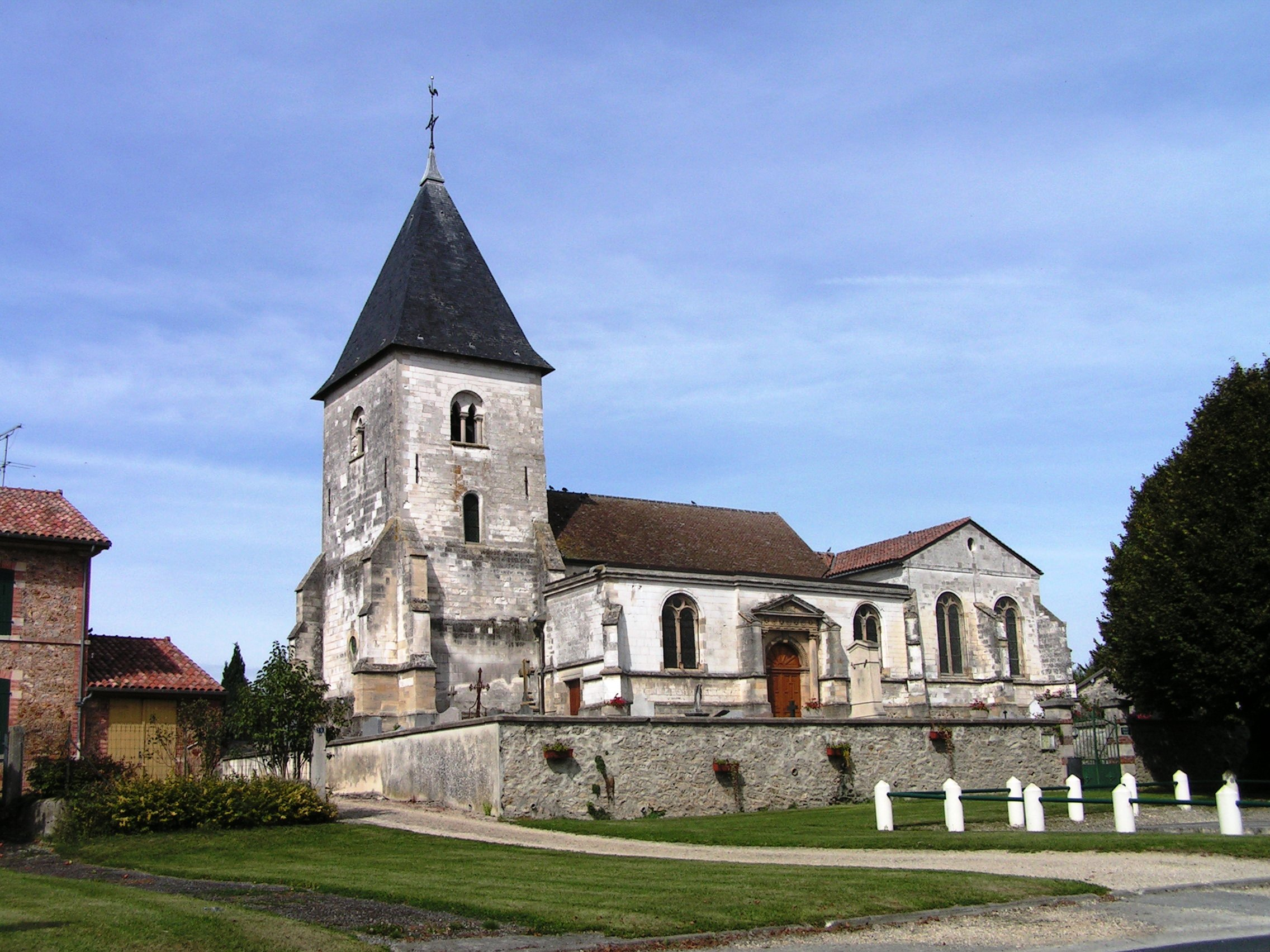 Église Saint-Nicolas de Marson (Classé) .